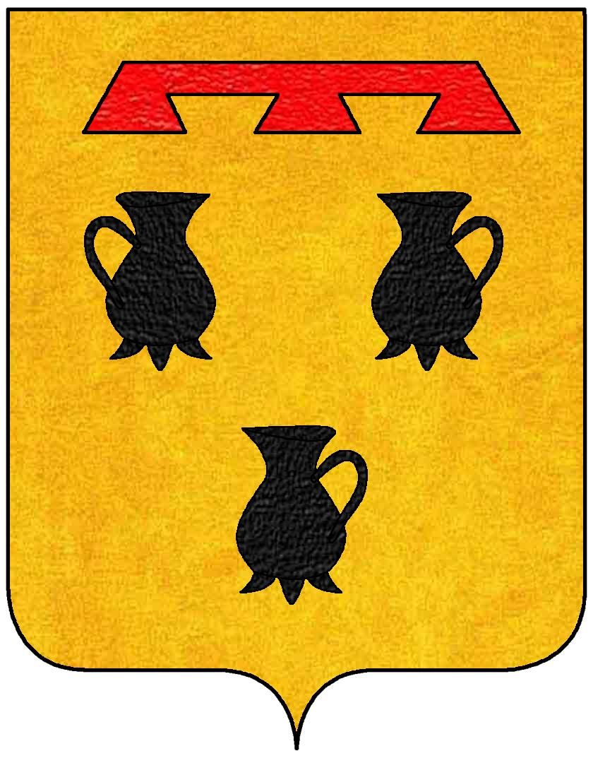 Stemma della famiglia Pignatelli